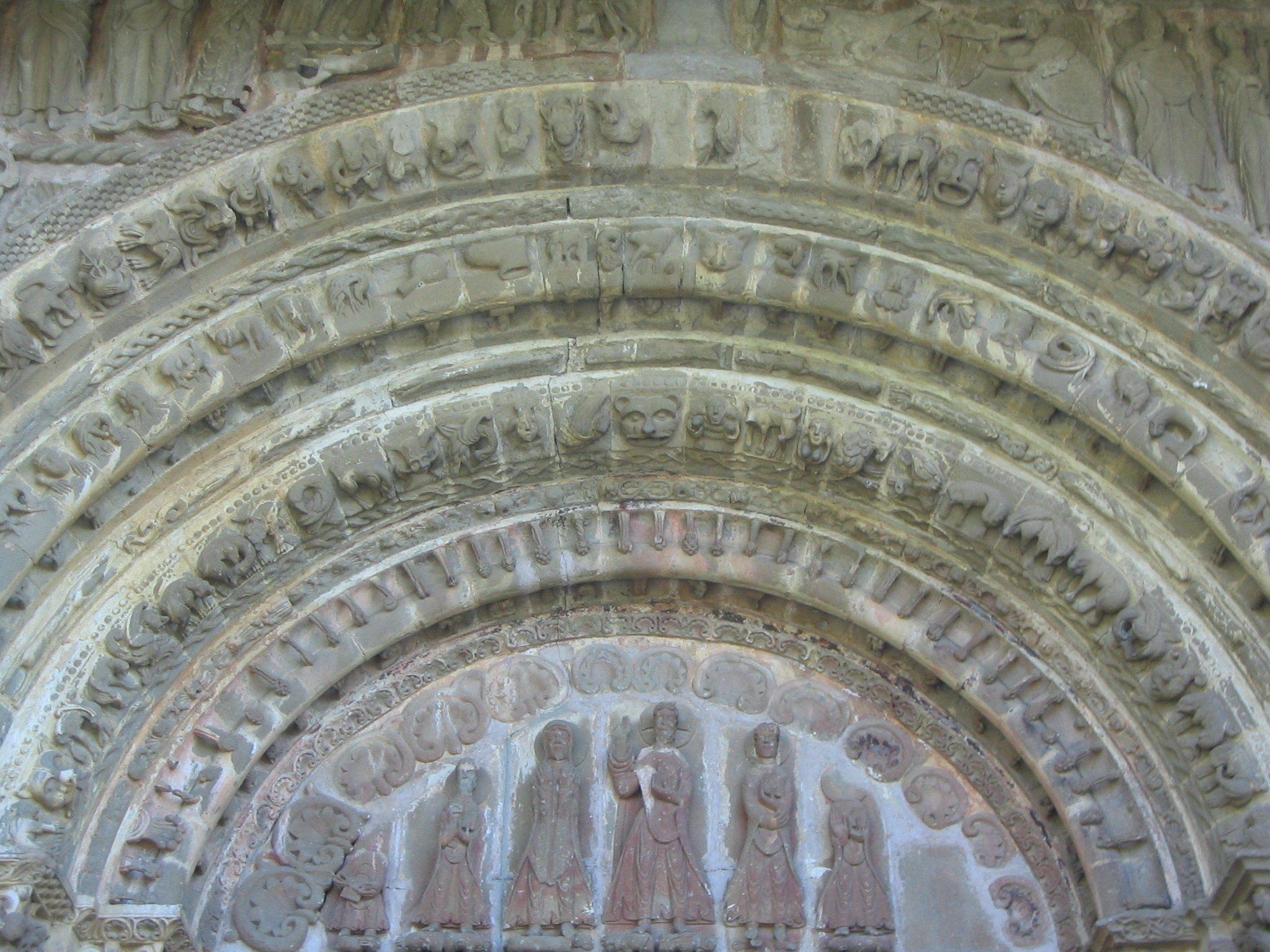 Monasterio de Leyre, porta Speciosa, Yesa, Navarra (España).